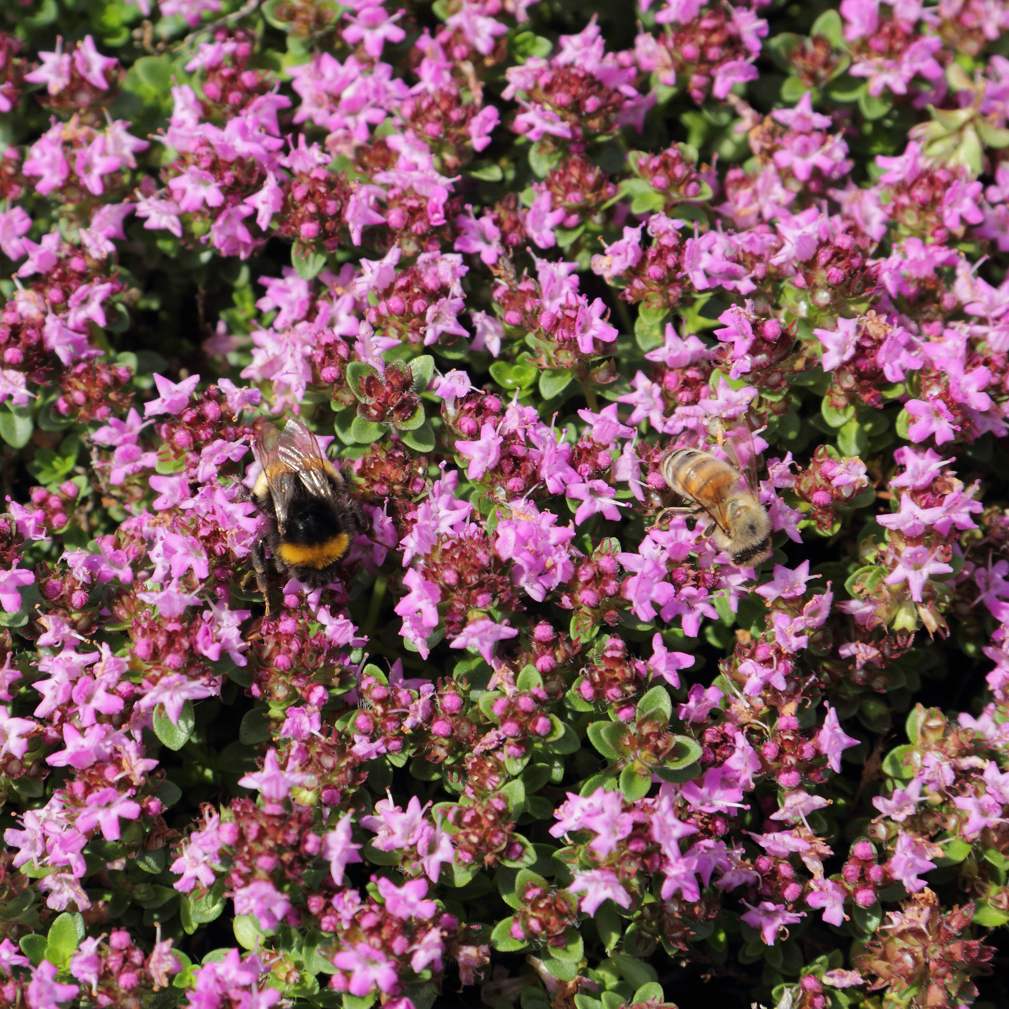 Thymus praecox ssp. ligusticus, identifierad med hjälp av befintlig skylt vid Bergianska trädgården.